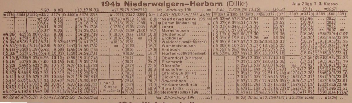 Fahrplan der Aar-Salzboede-Bahn 1944